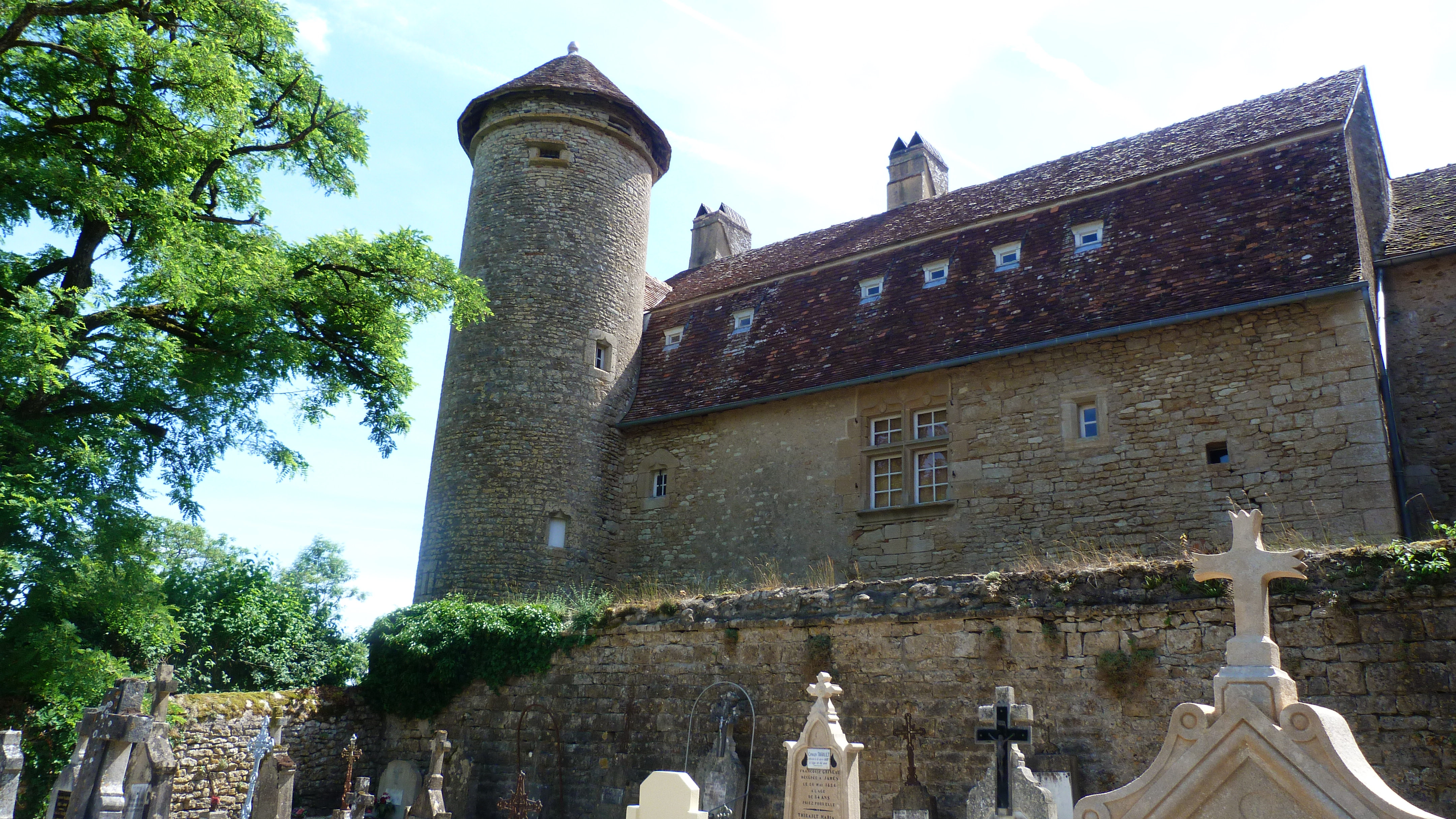 Priorejo de Moulins-Engilbert